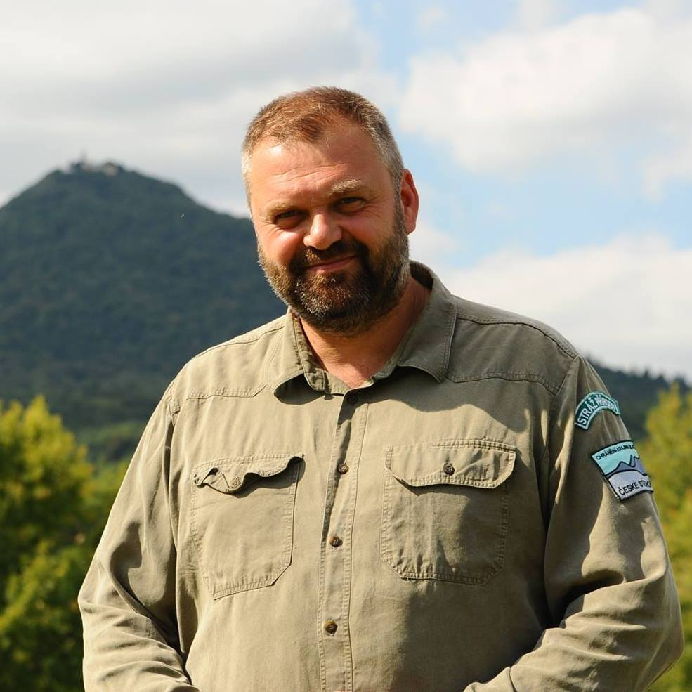 Daniel Pitek